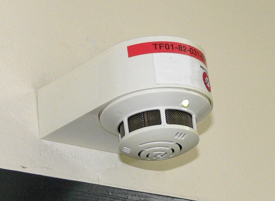 Optischer Rauchschalter einer Feststellanlage. Autor: Lars Karlsson